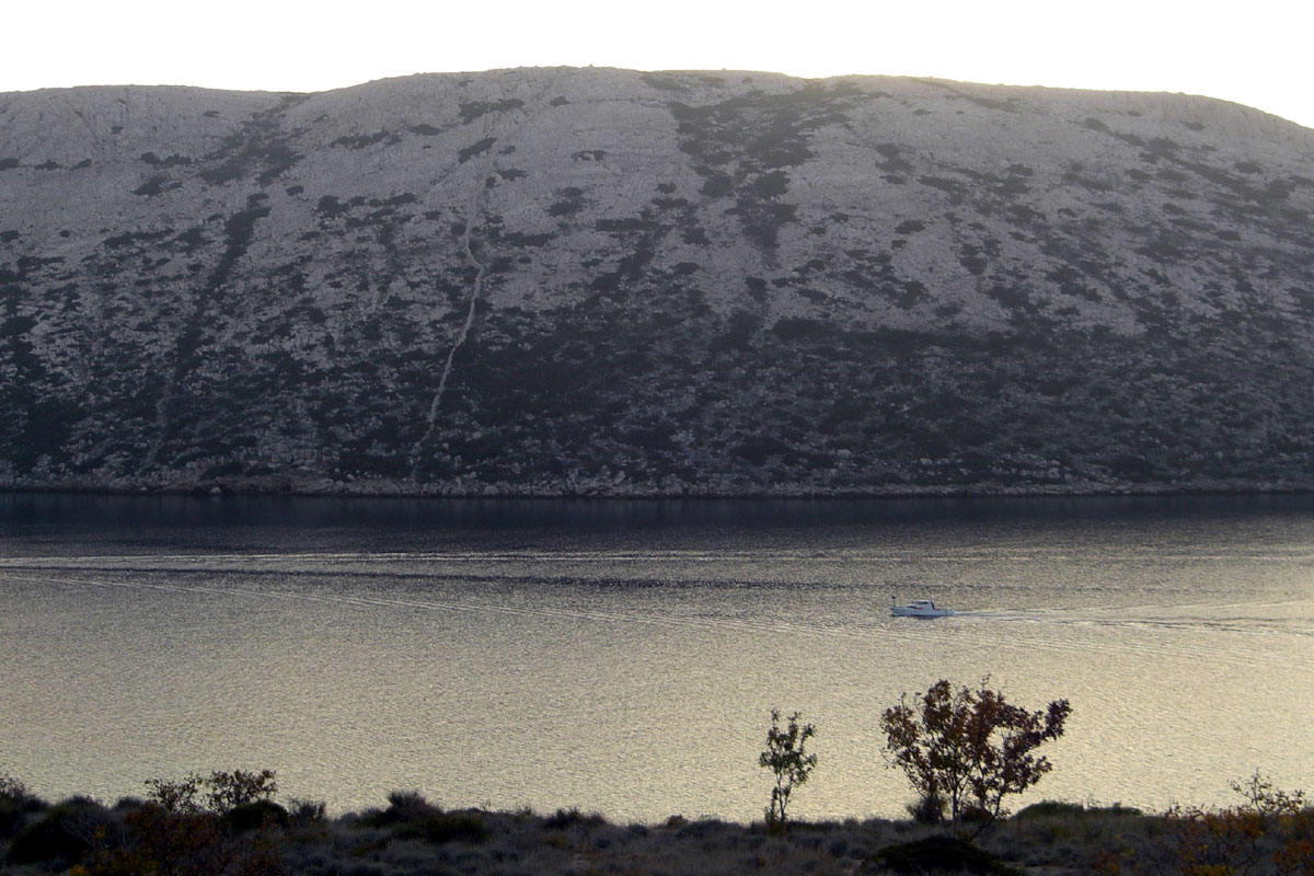 Otok Dolin i Barbatski kanal, pogled s otoka Raba